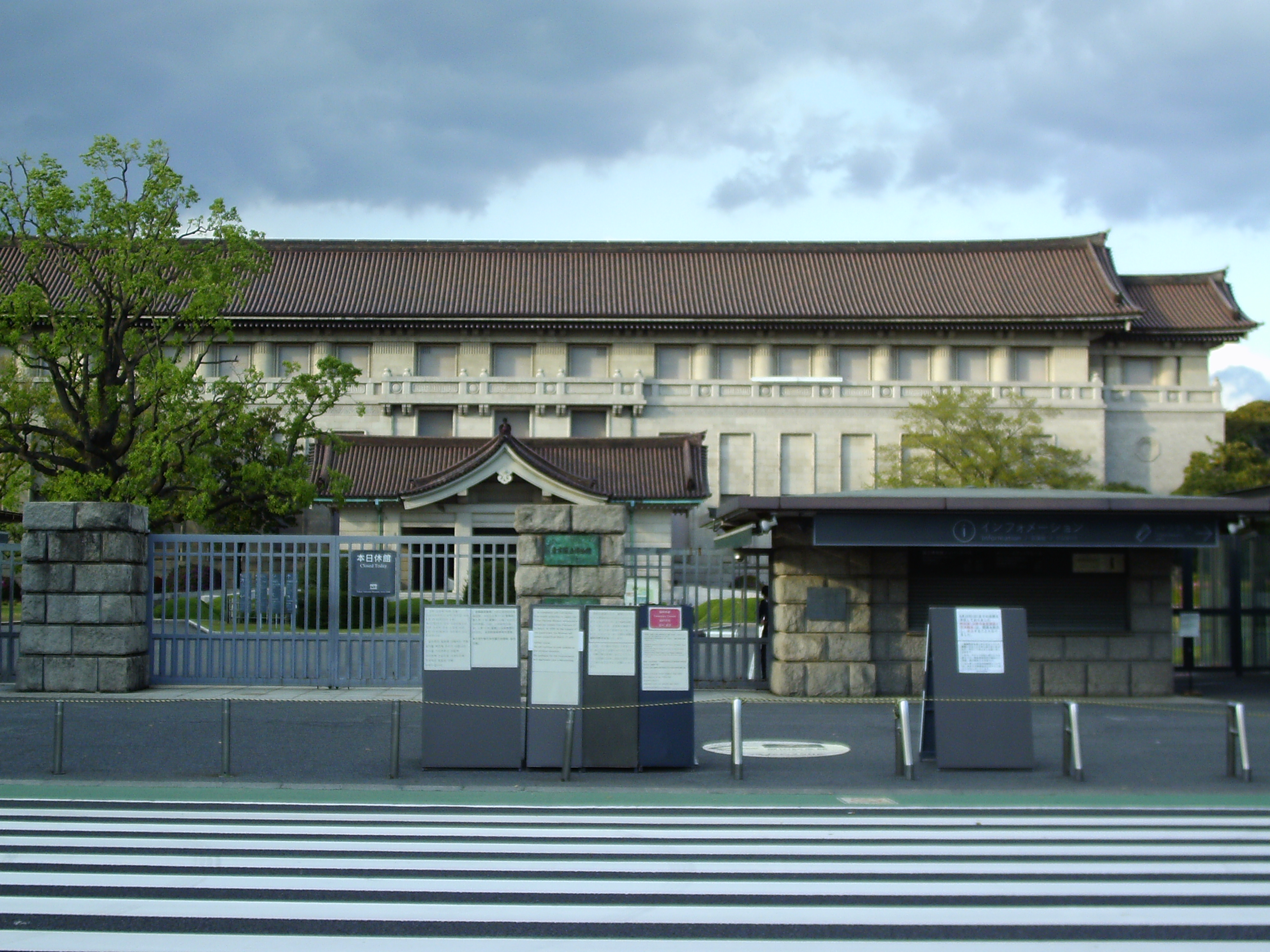 巣籠りで2,3日一歩も家から出なかったところ血行が悪くなり手足末端が痺れてきたため、早朝の人出が少ない時間に自転車で行ける上野公園まで走り運動してきた。